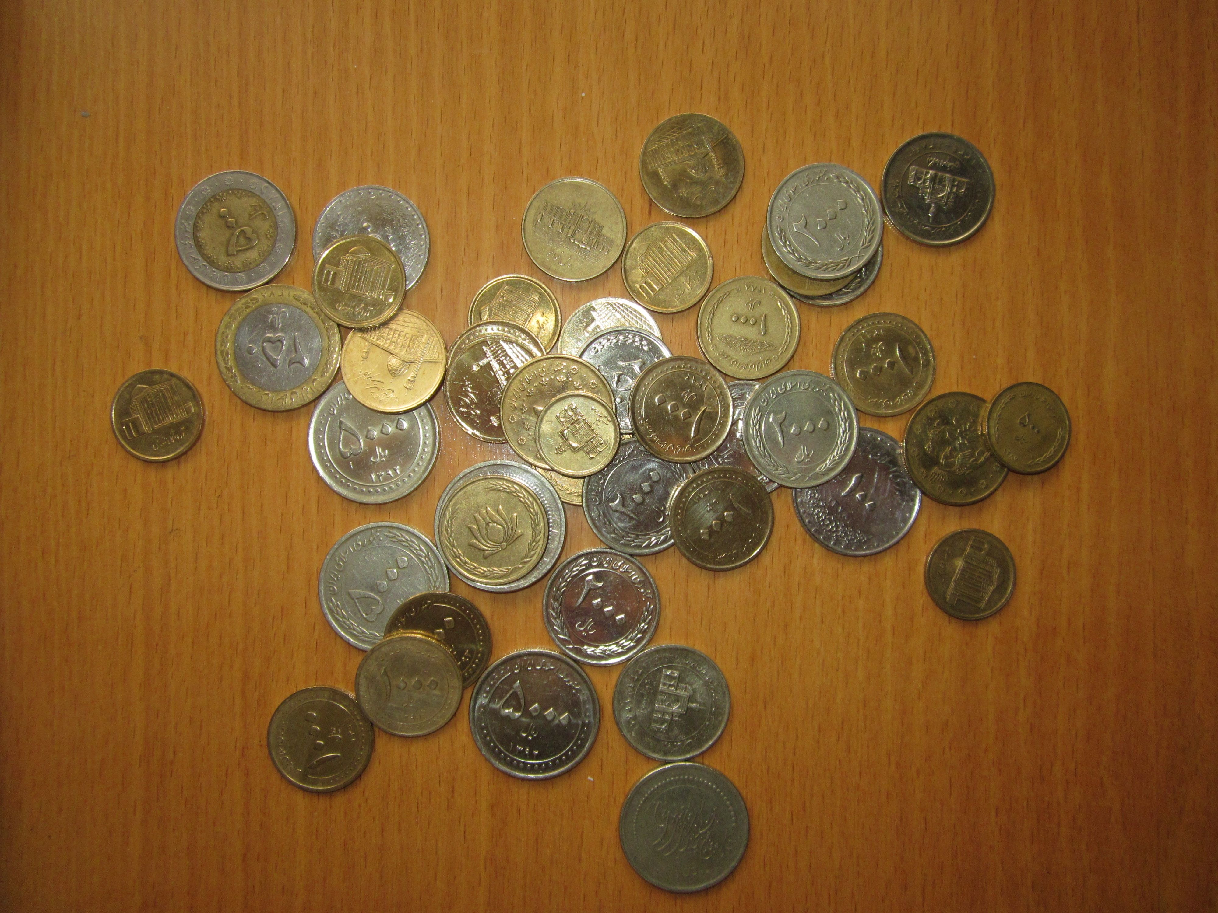 تعدادی سکه متعلق به دوران جمهوری اسلامی ایران